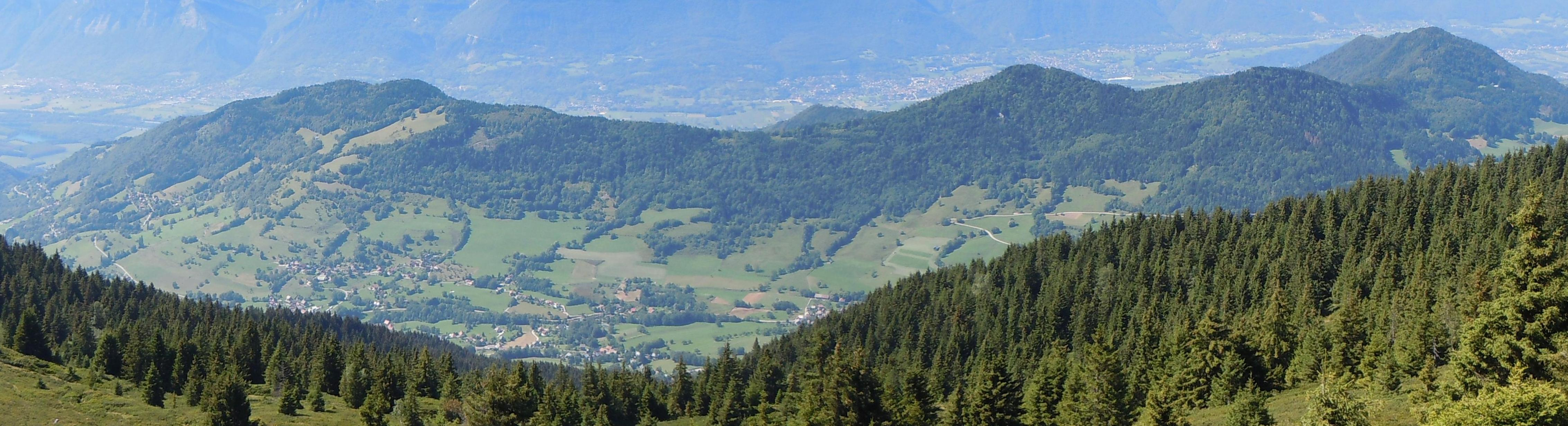 Coteau de l'Adret (depuis le Mont Luisard) - Theys - Isère - France